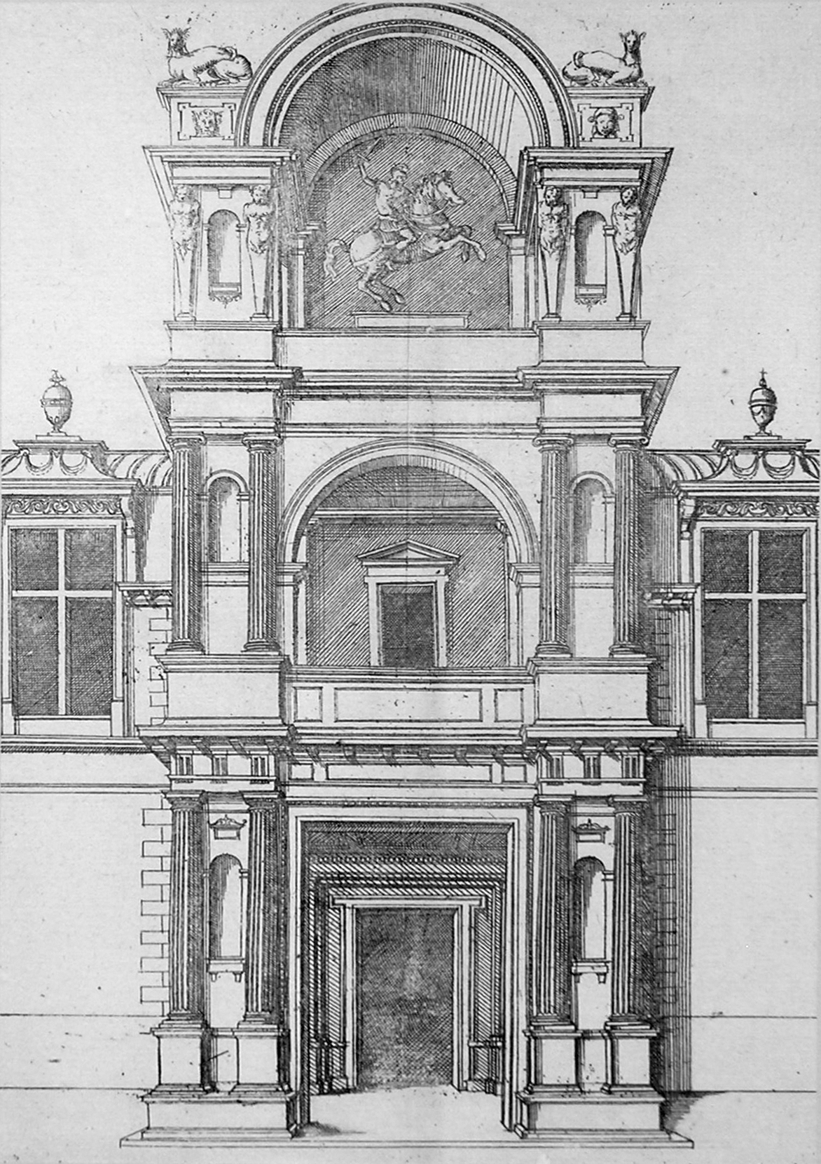 dessin de la statue équestre du connétable de Montmorency, au château d'écouen.